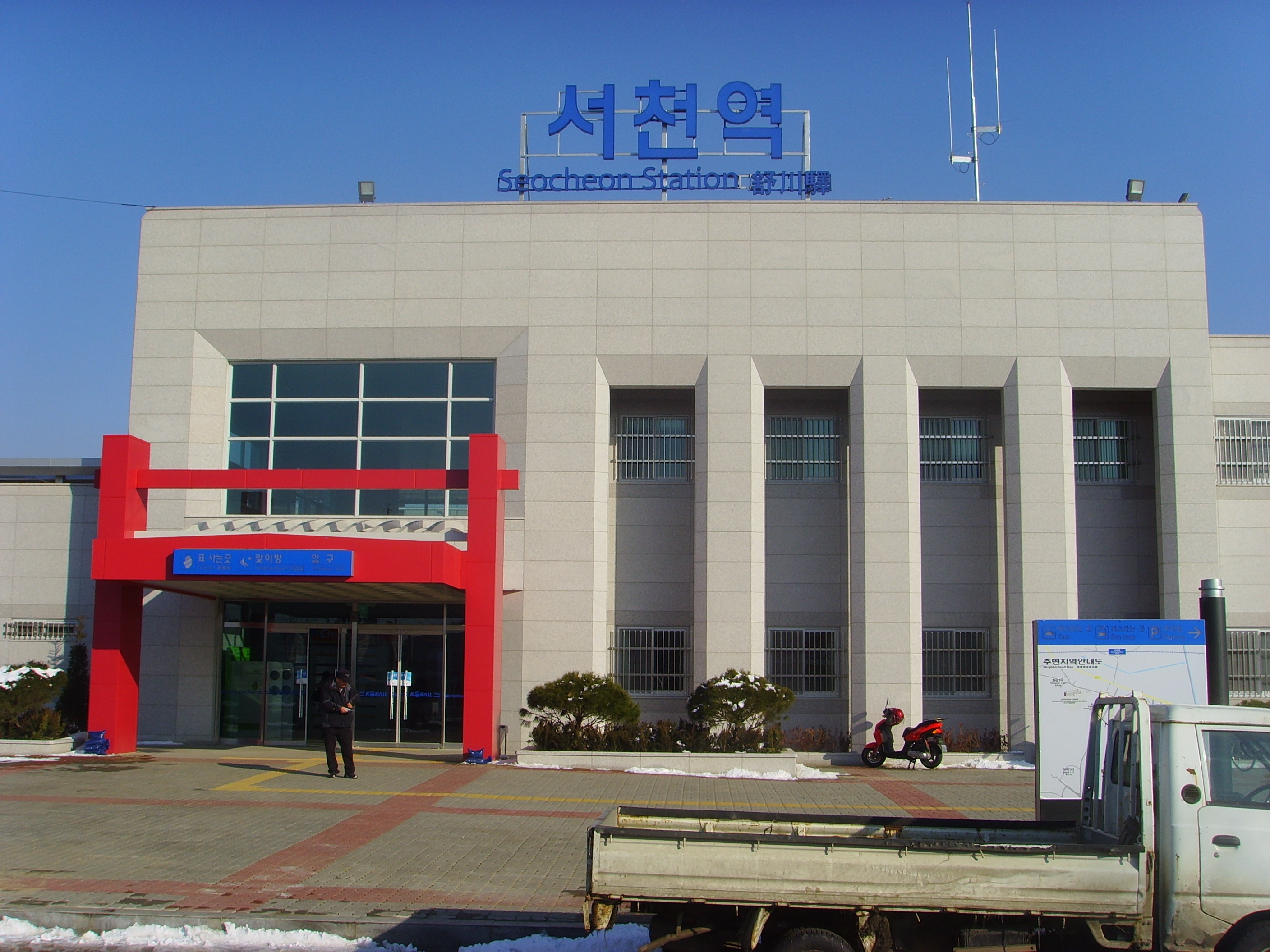 장항선 신서천역